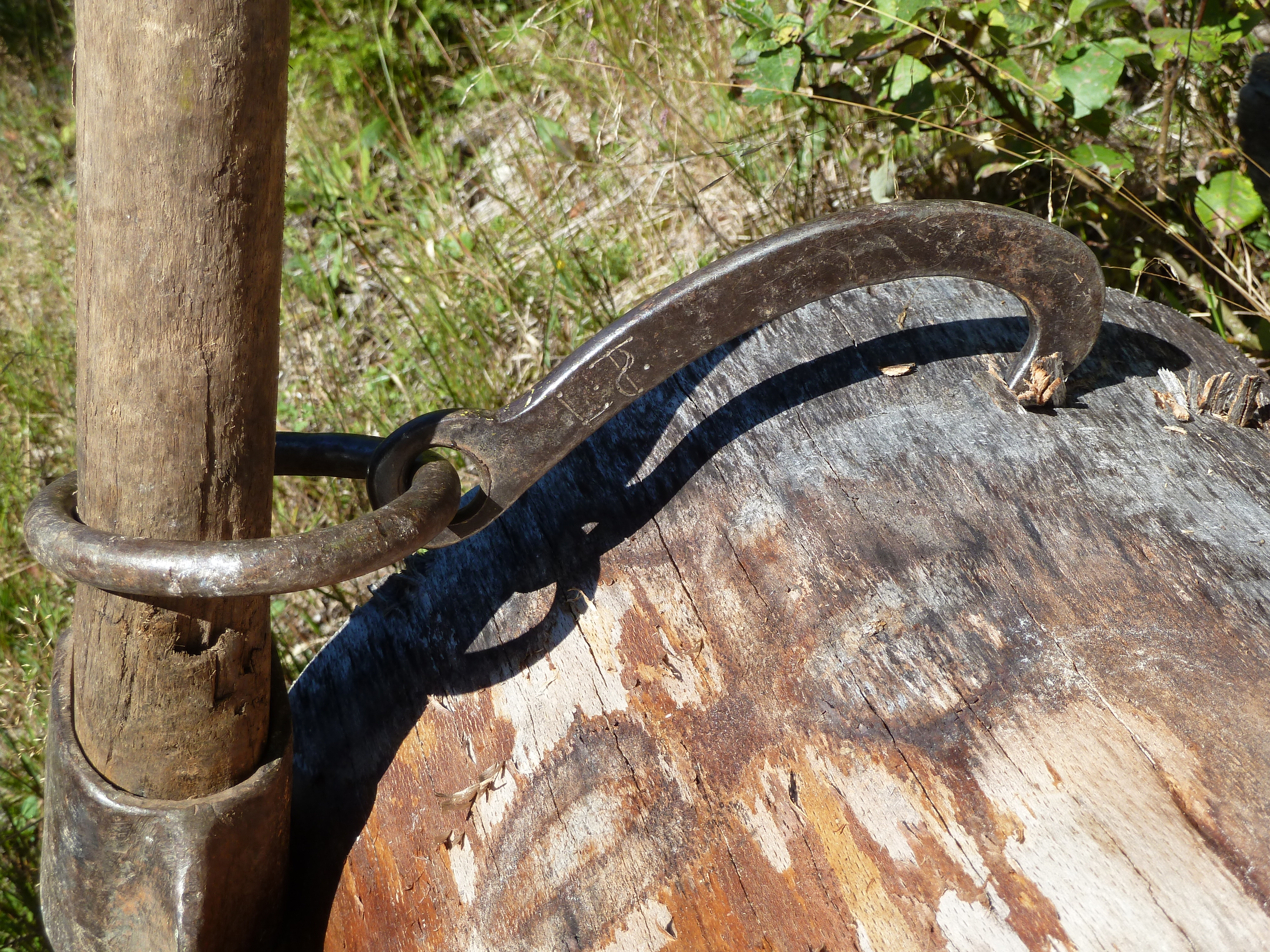 "Krempen" und Wendehaken im Einsatz